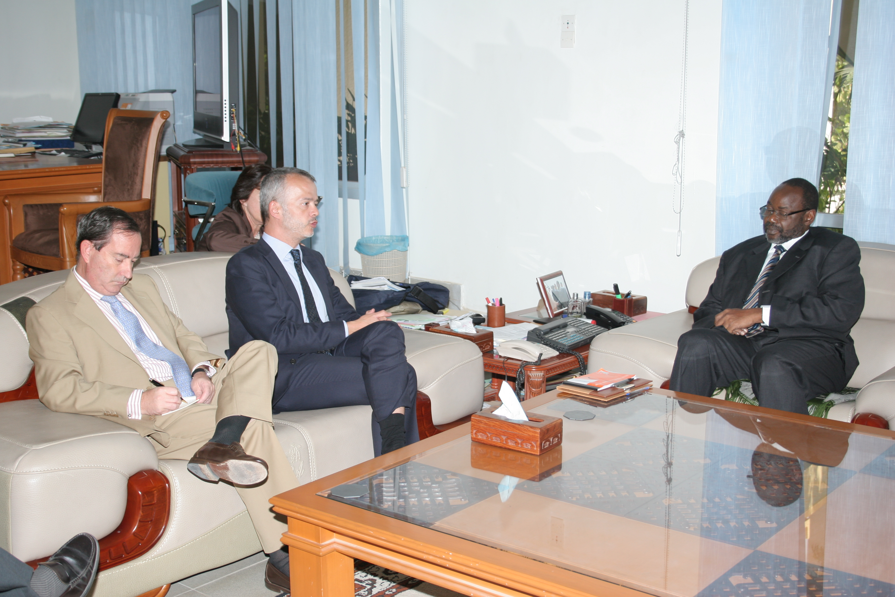 [Jemal Oumar] Spanish officials met with Mauritanian Interior Minister Ould Beilil to discuss strengthening defence collaboration. اجتماع مسؤولين إسبانيين بوزير الداخلية الموريتاني ولد ابيليل لمناقشة تعزيز التعاون في مجال الدفاع. Les autorités espagnoles ont rencontré le ministre mauritanien de l'Intérieur Ould Beilil pour discuter du renforcement de la collaboration en matière de défense. Full story: القصة L'article